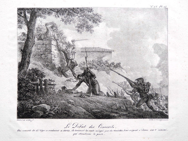 Litografía francesa sobre el ataque francés a la ciudad española de Soria en 1812.